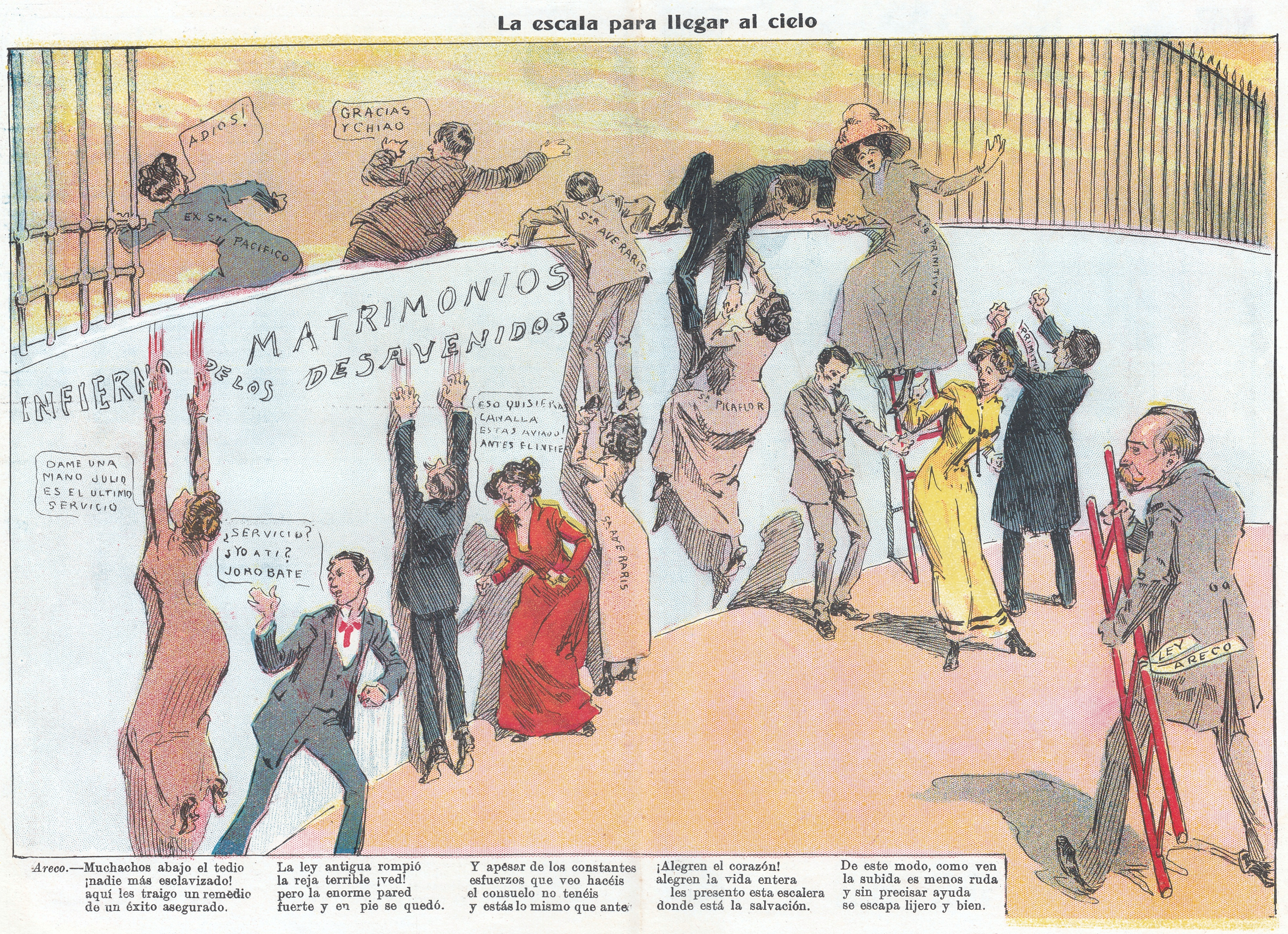 Caricatura sobre la ley de divorcio por la sola voluntad de la mujer de los políticos uruguayos Ricardo Areco y Domingo Arena.